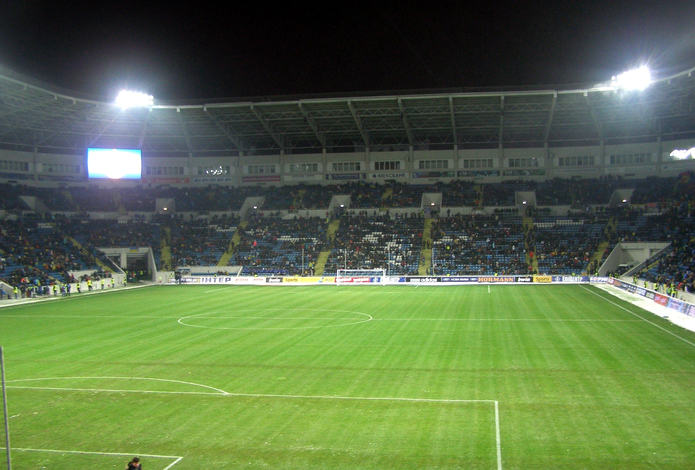 Стадіон "Чорноморець" в Одесі під час гри Україна-Молдова